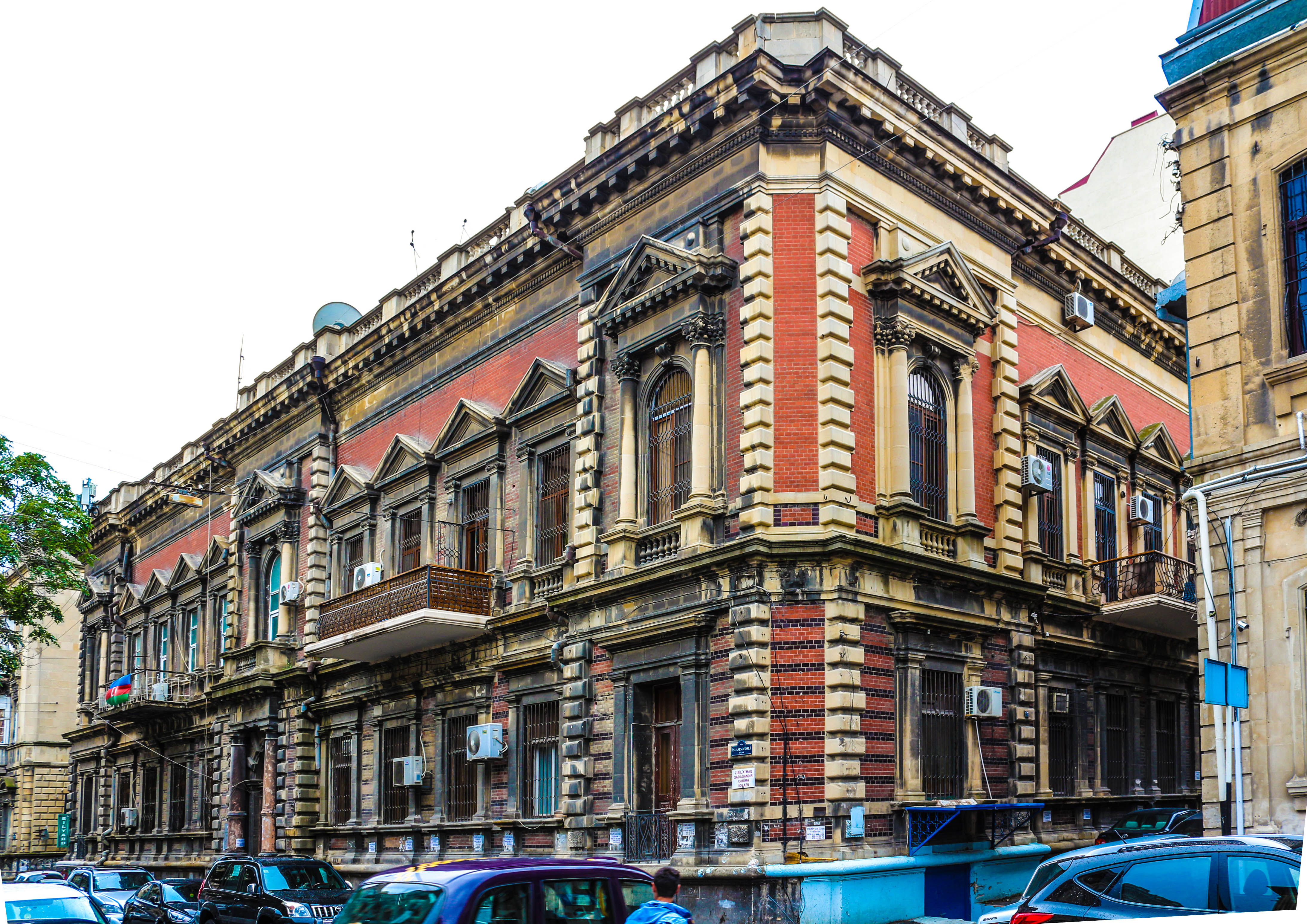 Sabir adına kitabxananın binası